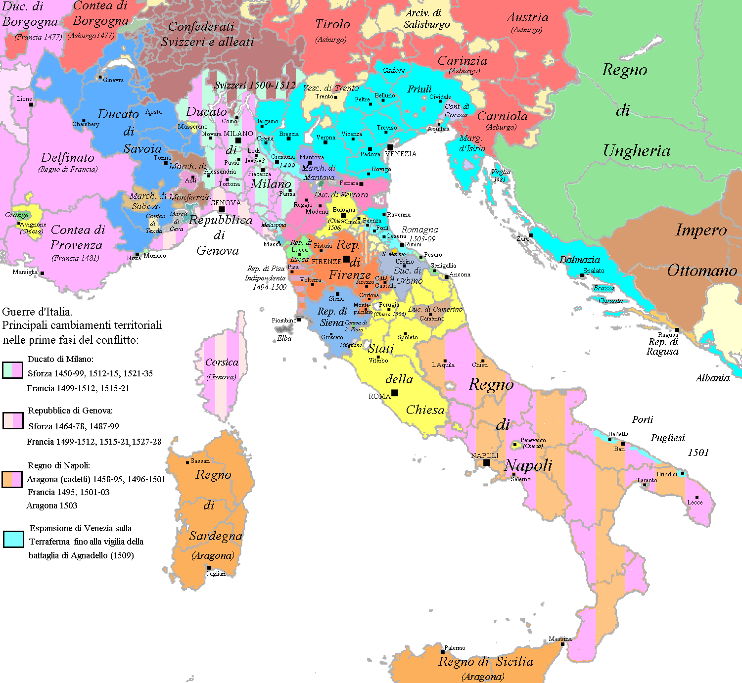 Cambios territoriales en los distintoes estados de Italia durante las guerras de finales del siglo XV y primer tercio del XVI